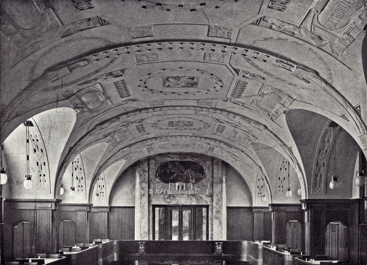 Berlin - Weinhaus Rheingold, Ansicht des Bankettsaales in Richtung des Saalbaues an der Bellevuestrasse